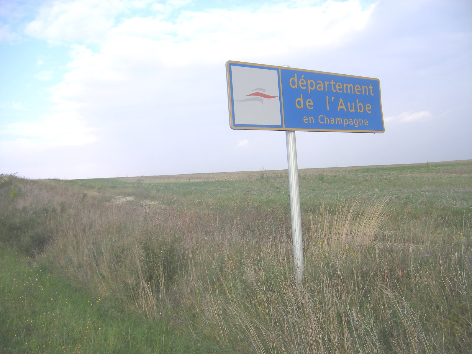 Border sign between Neuvy-Sautour and Villeneuve-au-Chemin (N77 route)